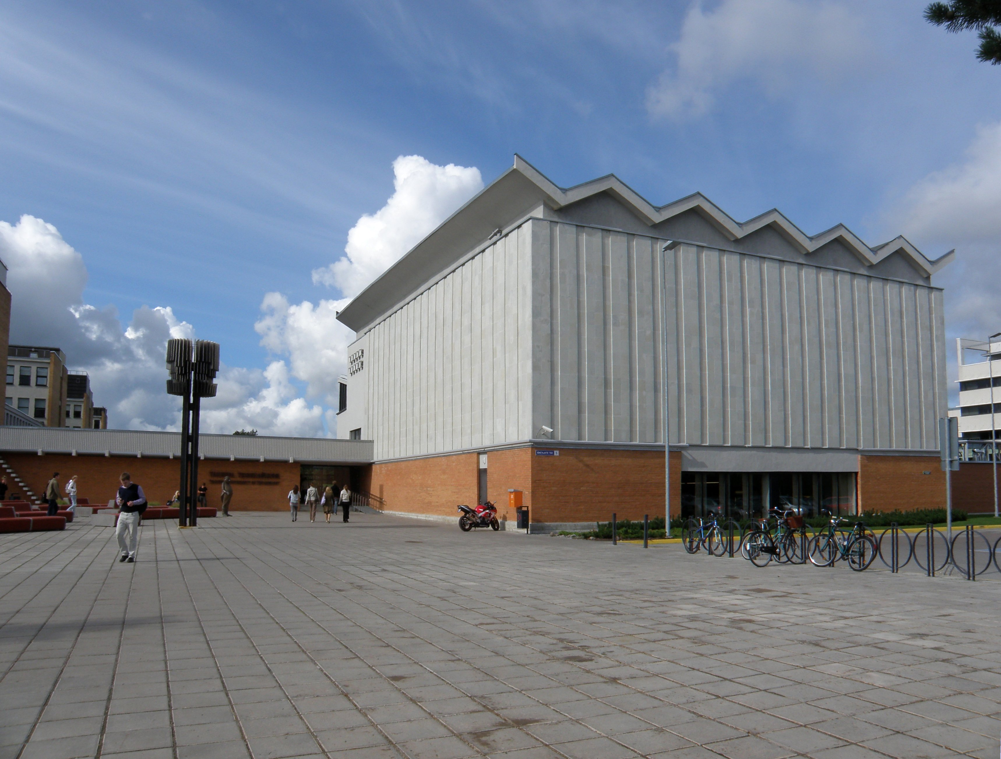 Tallinna Tehnikaülikooli peahoone